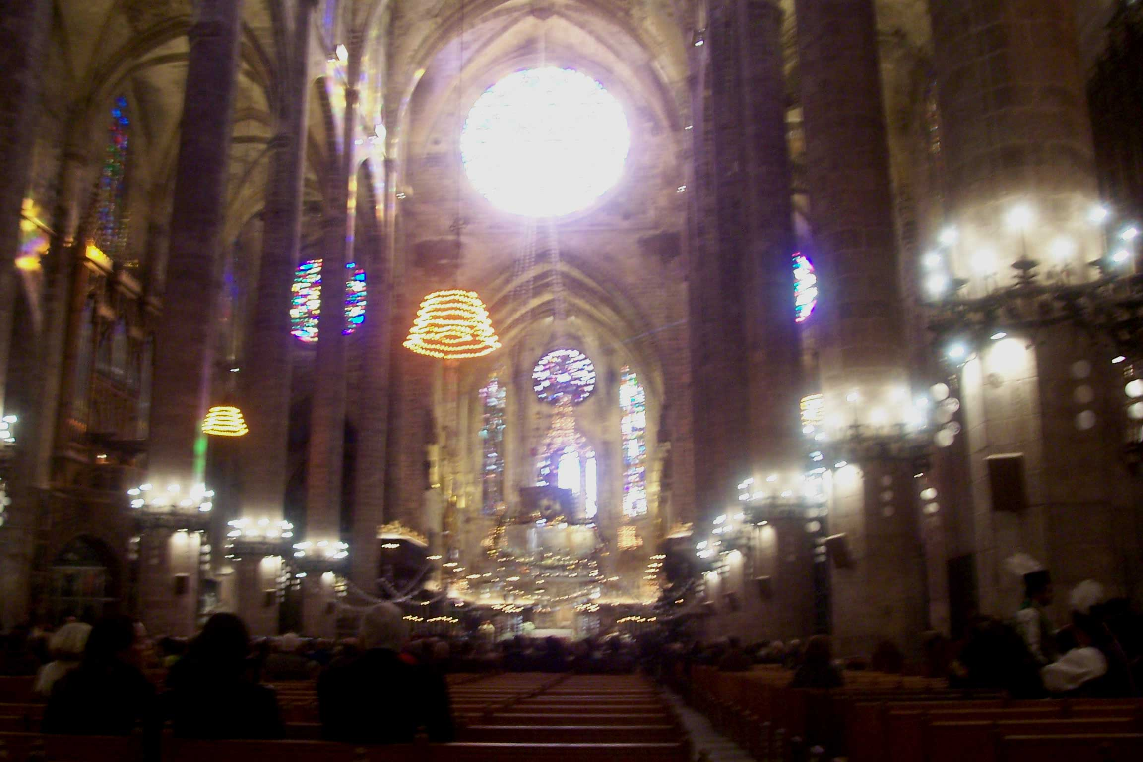 Catedral de Palma